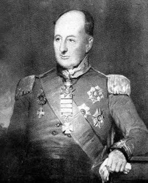 Sir Benjamin d'Urban (1777-1849), général britannique et gouverneur du Cap.